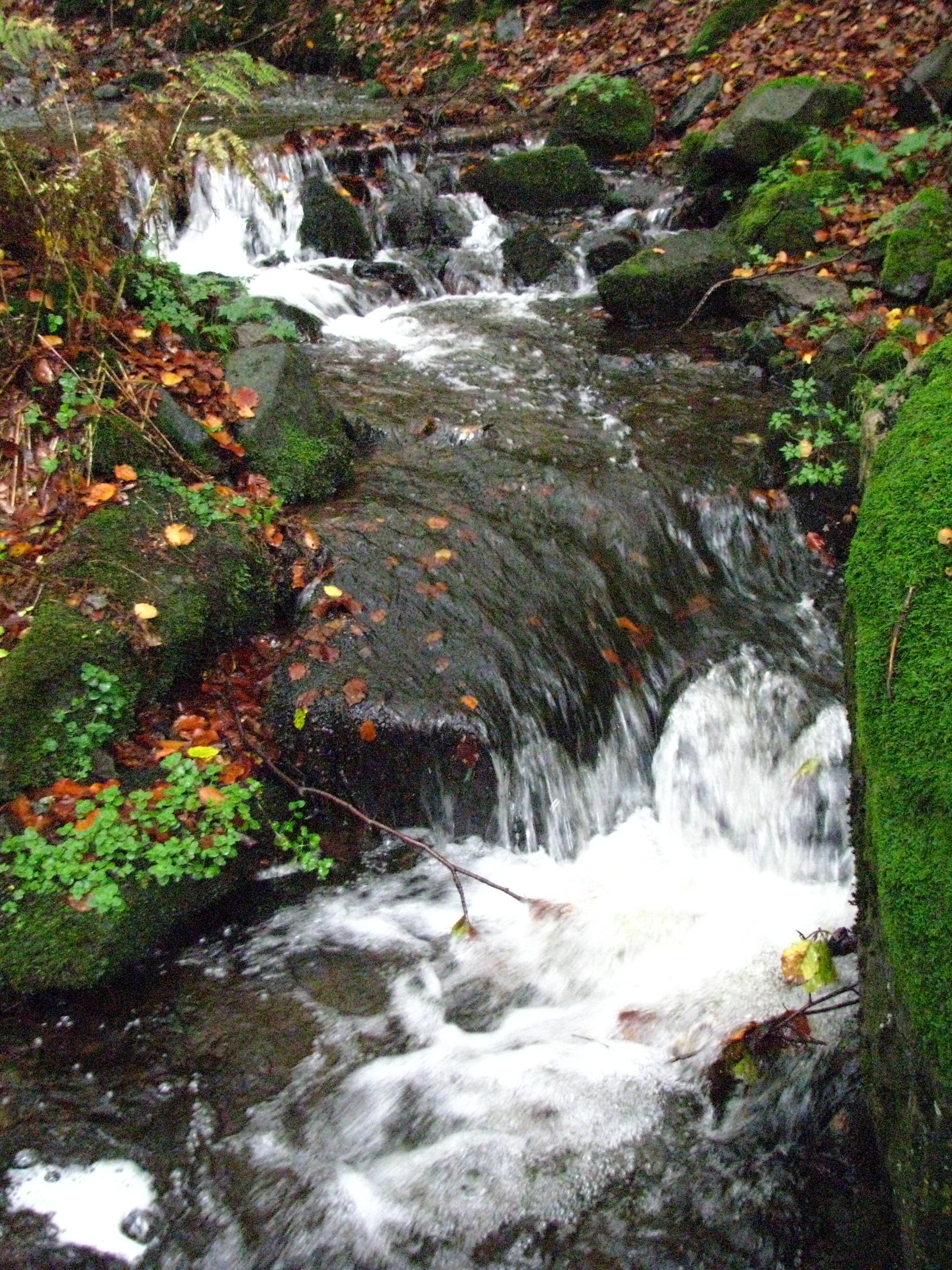 Detail des Bachlaufs der Spitter unterhalb des Spitterfalls.